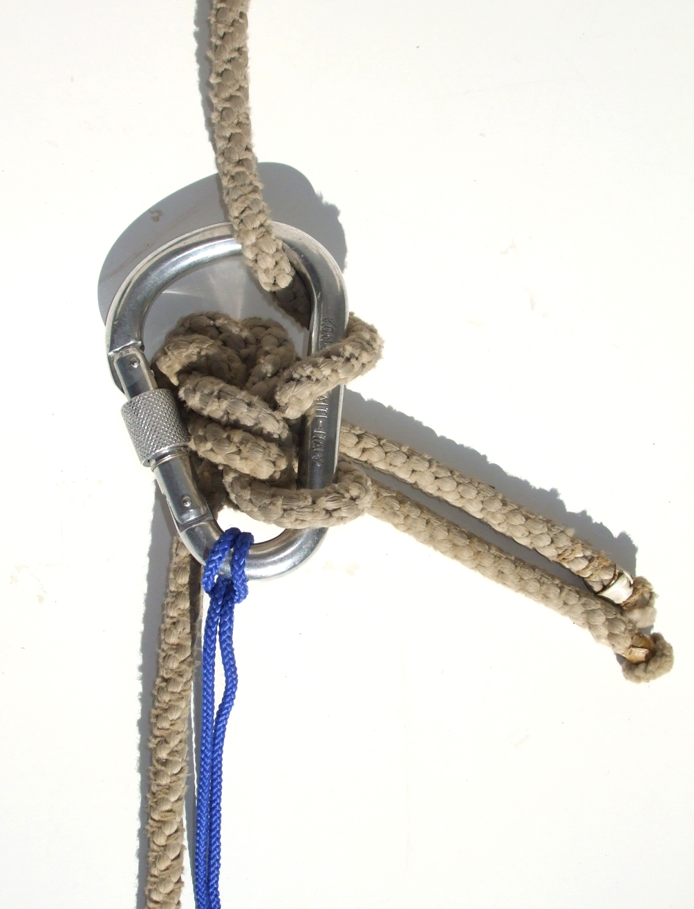 Der Anbindeknoten mit dem Verlängerungsseil war zu dick und passte nicht durch den Karabiner